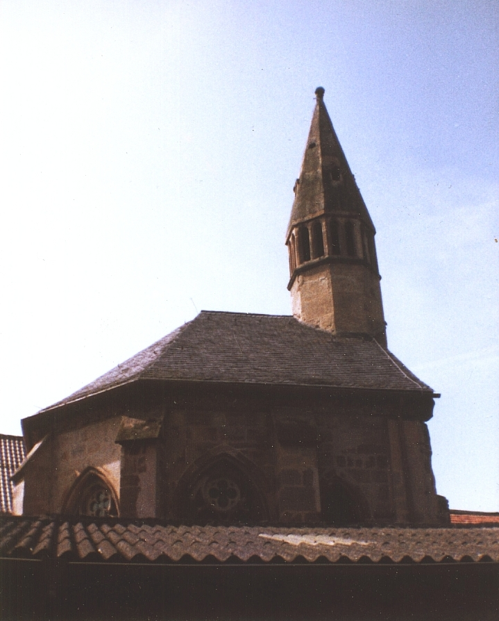 Hof Iben, ehemalige Templerkapelle